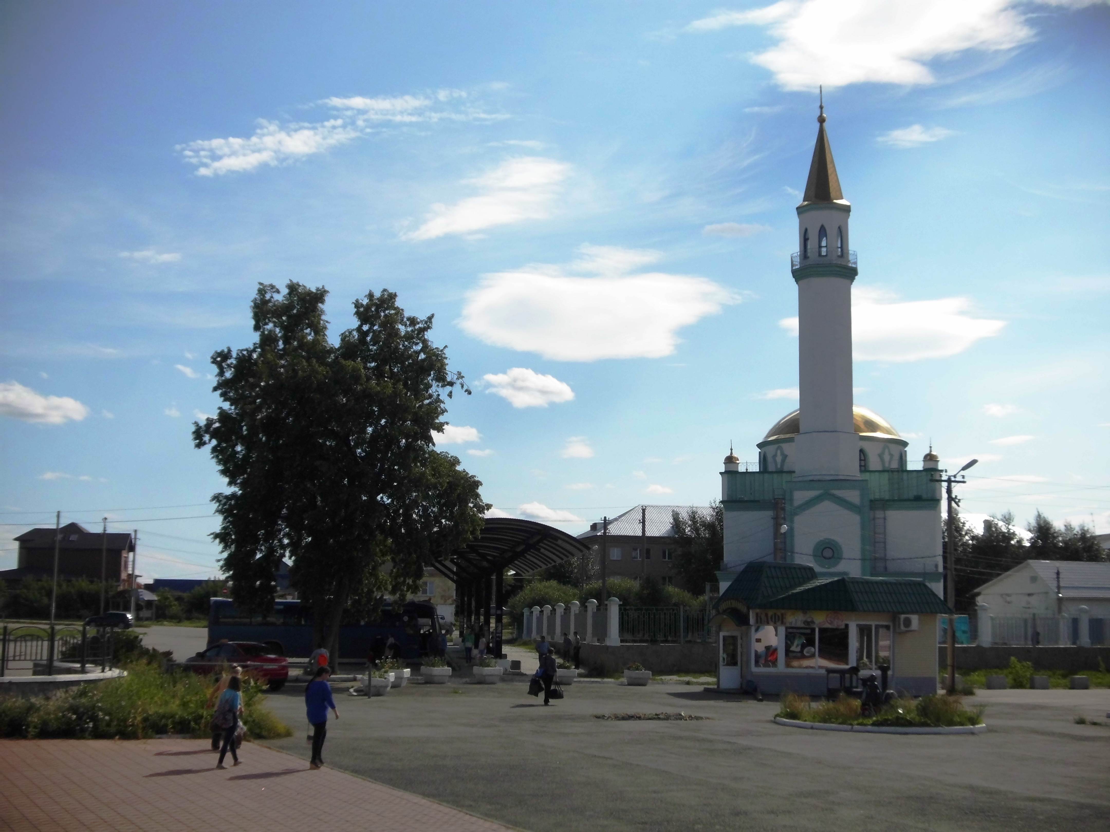 Мечеть и перроны автостанции с южной стороны железнодорожного вокзала в городе Кыштыме Челябинской области.